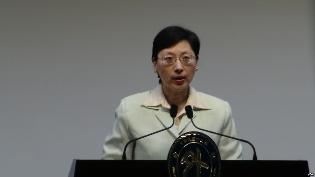 中華民國外交部發言人高安說明廣大興28號事件司法調查進展。